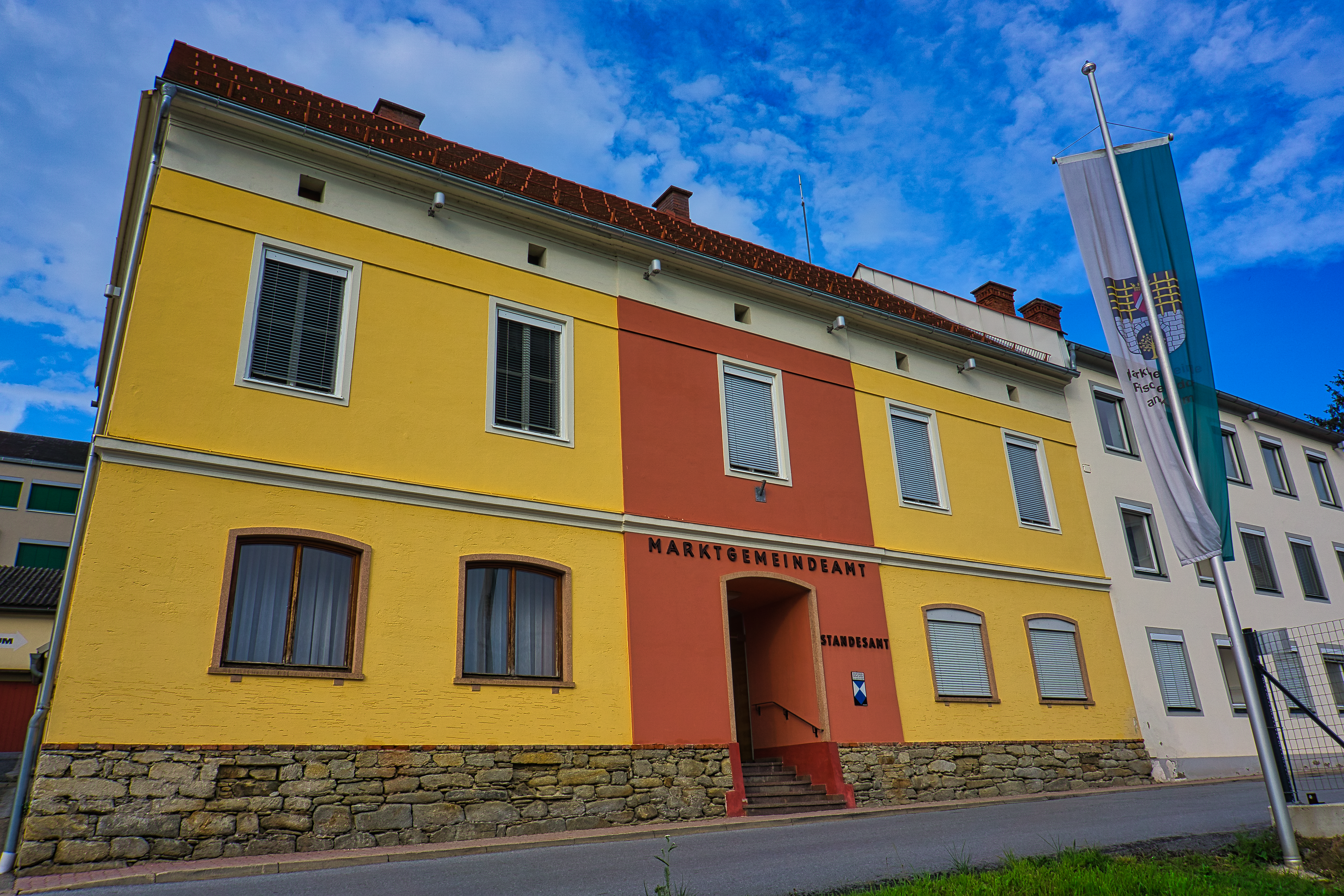 Marktgemeindeamt und Standesamt von Pischelsdorf am Kulm